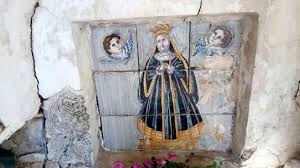 Particolare di maioliche del sec. XIX